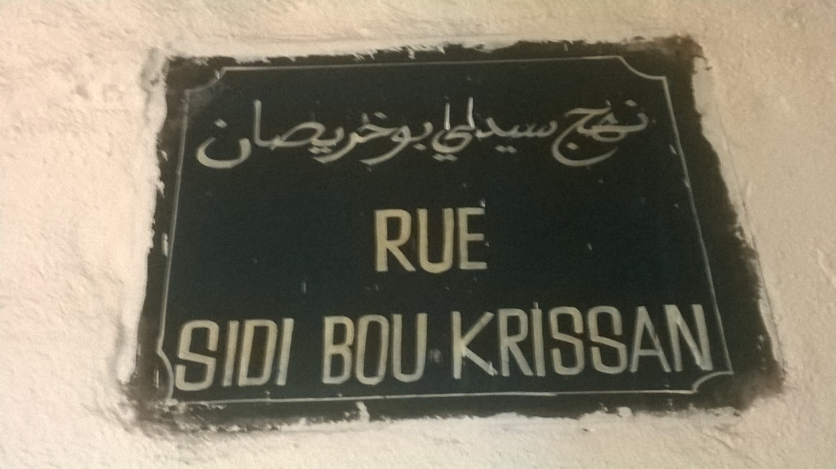 La médina de Tunis مدينة تونس العتيقة